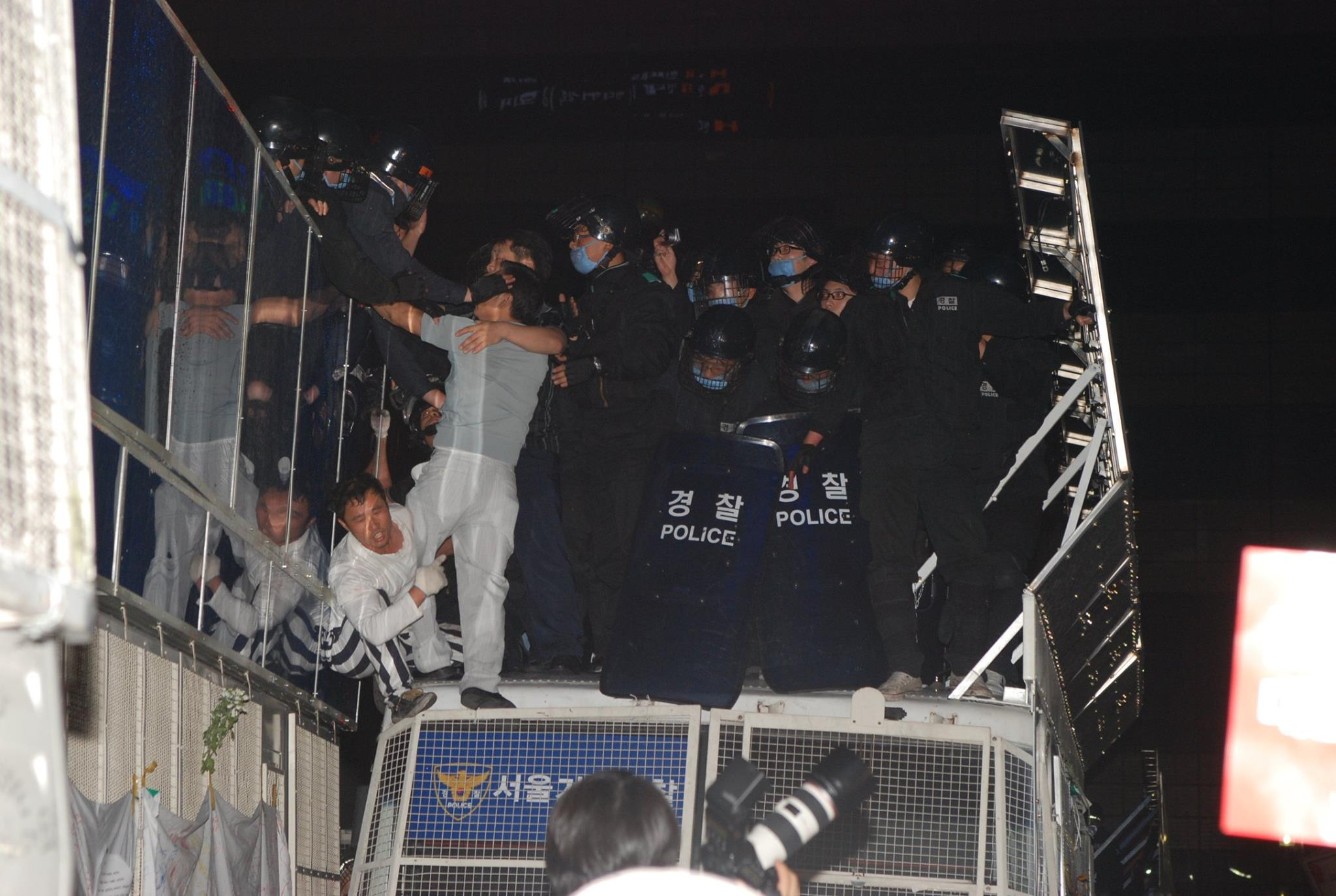 경찰 차벽을 넘어가며 경찰과 충돌하는 2008년 미국산 소고기 반대 시위대